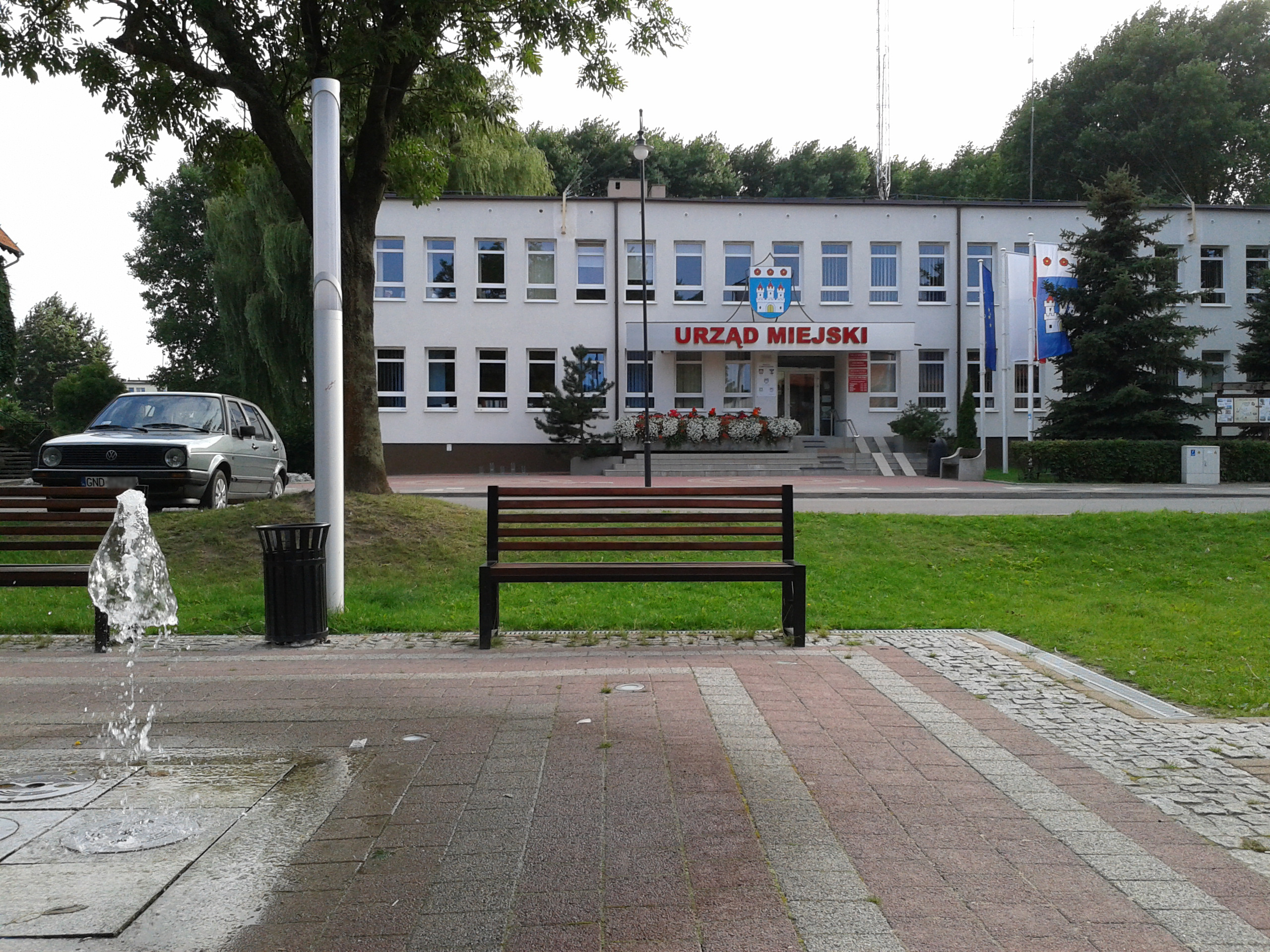 Nowy Dwór Gdański, Poland